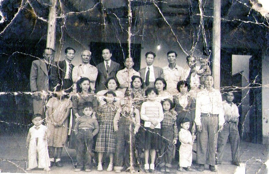 CHINOShaciendatecapa